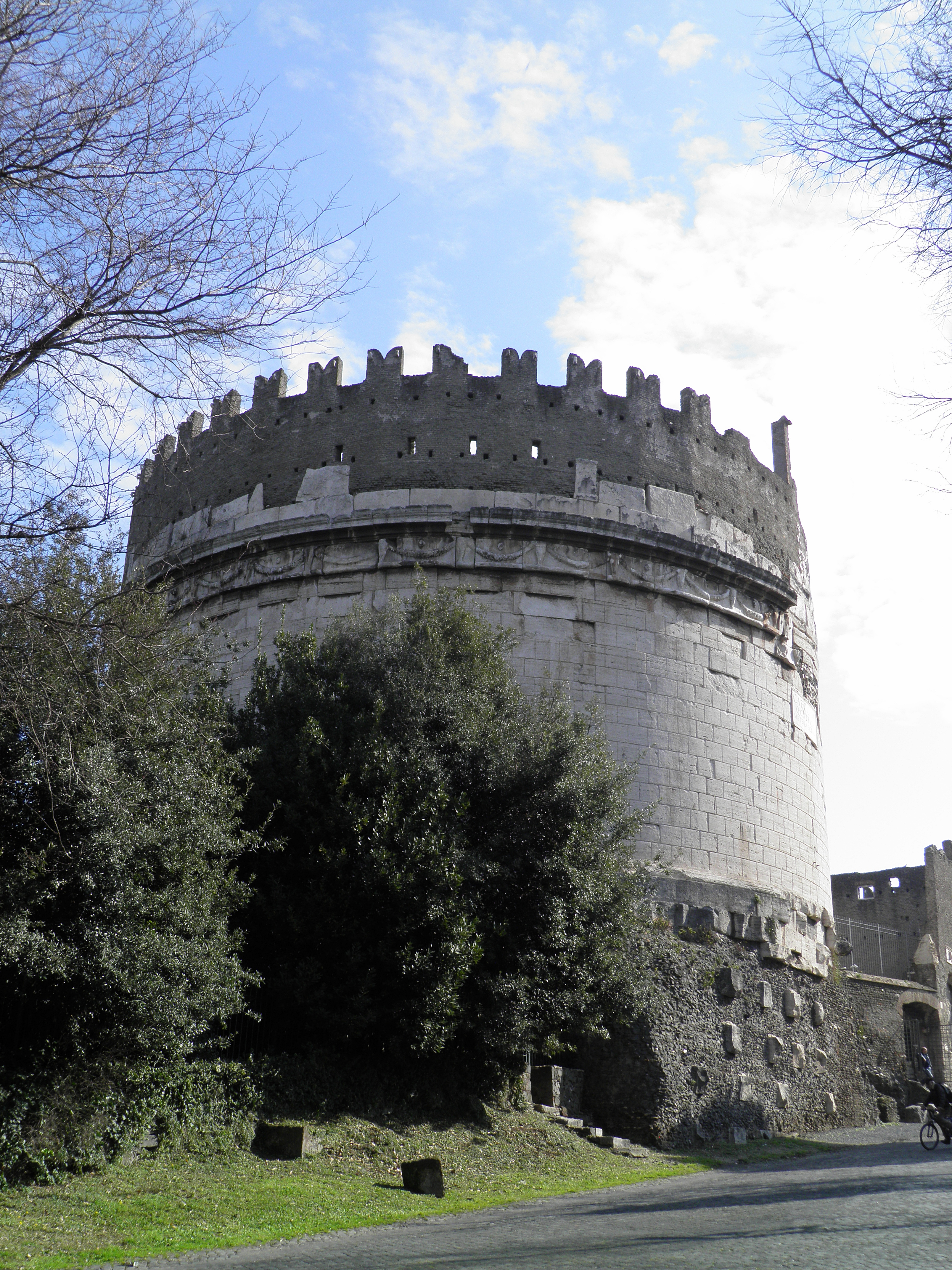 Mausoleum of Caecilia Metella, Via Appia